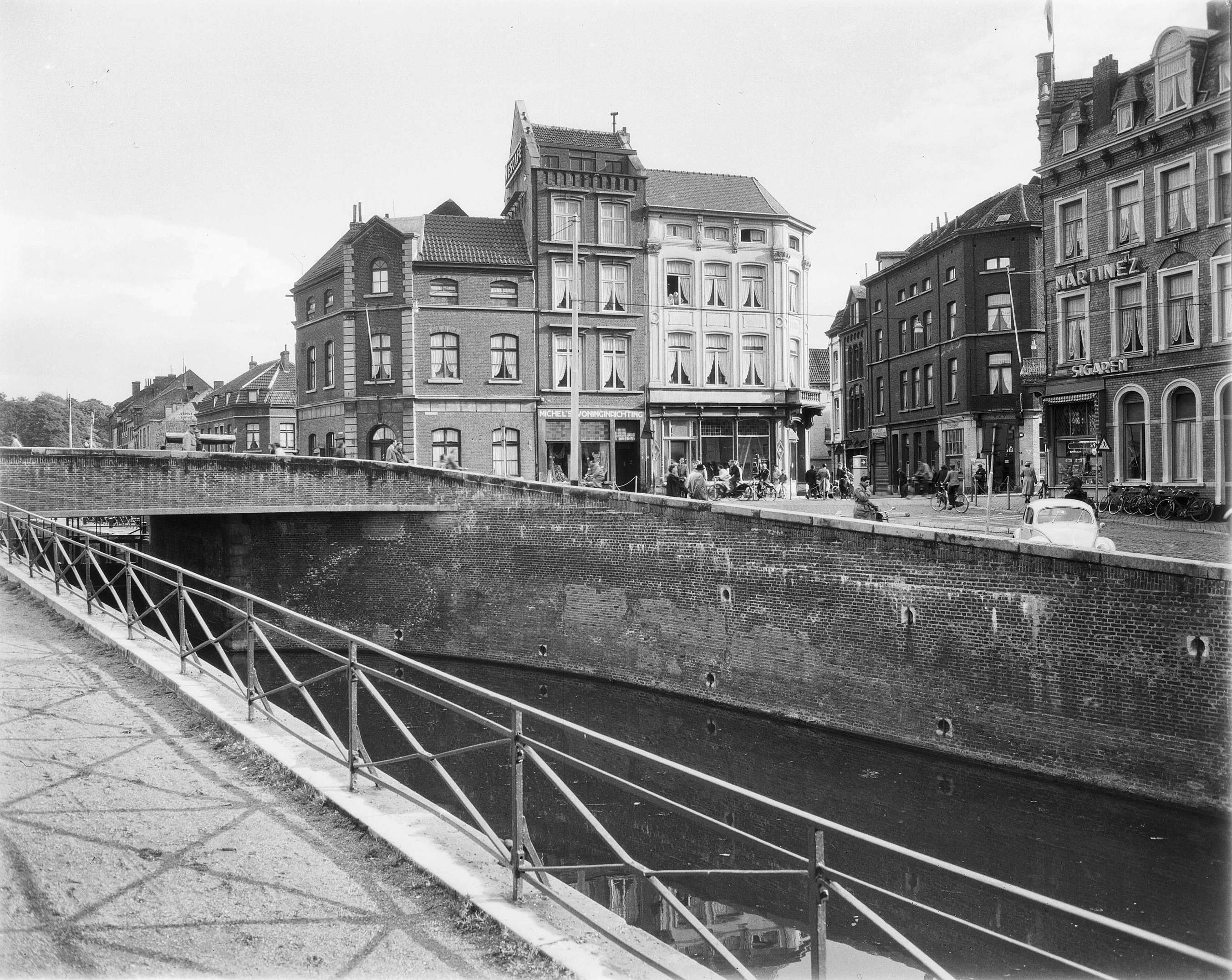 hoek Hogebrugstraat - Kleine Stokstraat , nr. Openbare werken 166